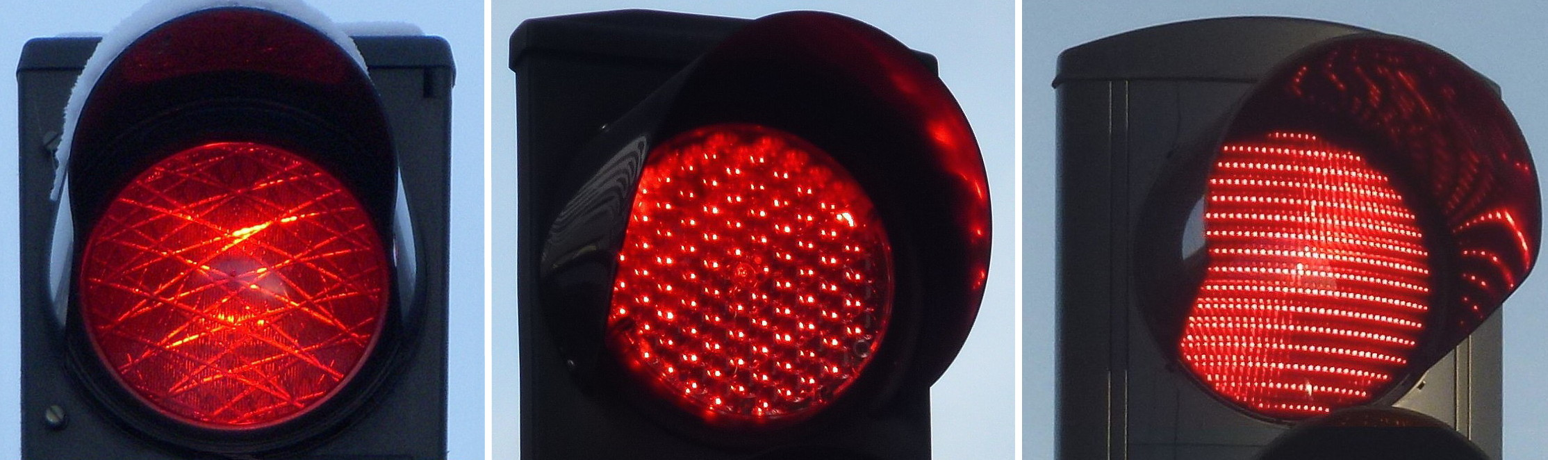 Trafiksignal med glödlampa (vänster), äldre LED och nyare LED